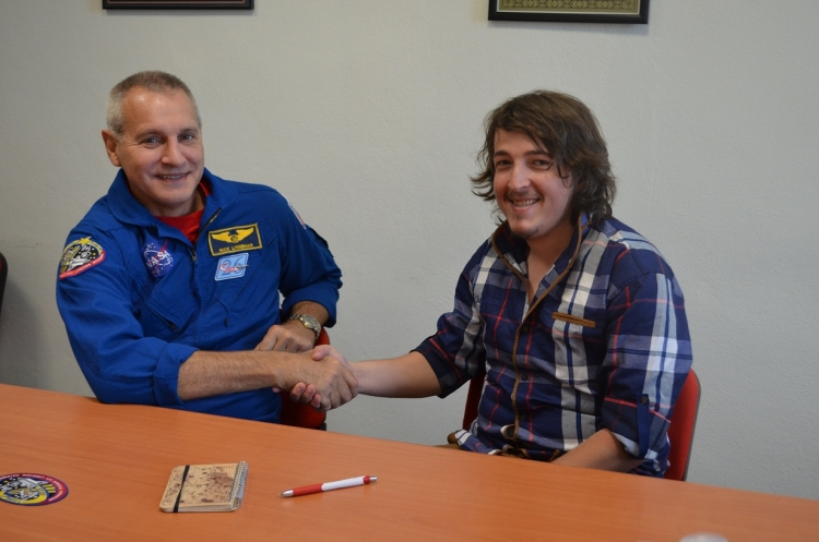 NASA Uzay Üssünden Astronot Richard Linnehan ile Gazeteci Yavuz Atalay